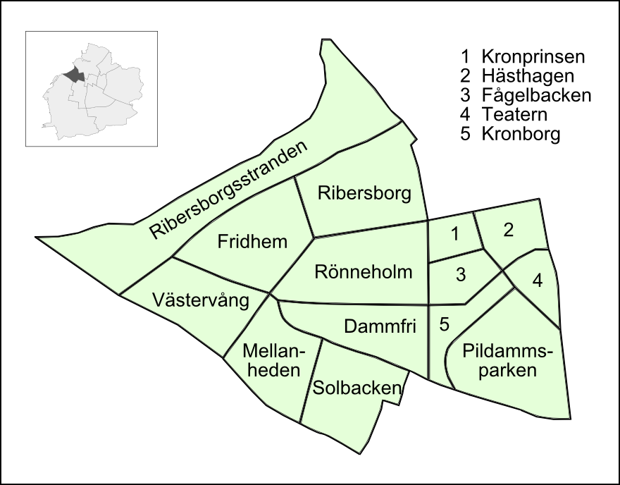 Delområden i Västra Innerstaden, Malmö 2009